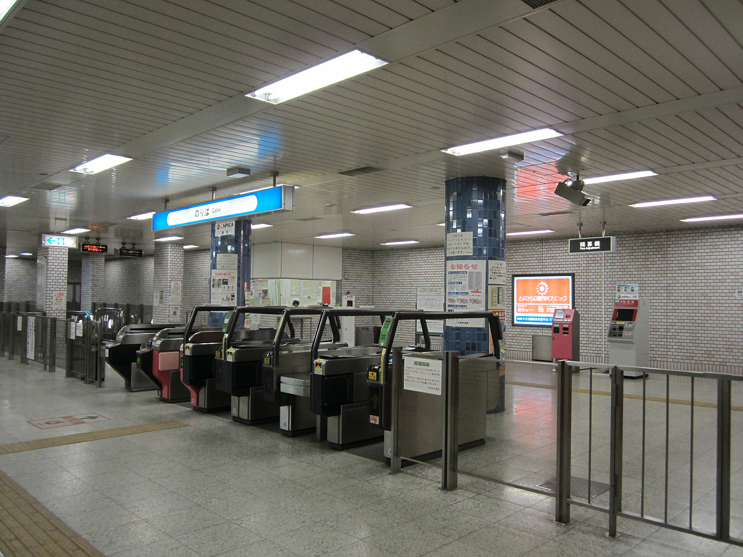 札幌市営地下鉄東豊線豊平公園駅改札口（北海道札幌市豊平区）